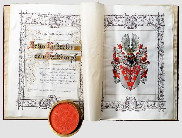 Adelsdiplom von Franz Joseph I. (Kaiser von Österreich, 1830-1916) für den k.u.k. Generalmajor Artur Kaltnecker im Landwehrkommando Lemberg. Ausgestellt am 2. April 1914 in Wien, eigenhändige Unterschrift des Kaisers, Gegenzeichnung des Ministers des Inneren und eines k.u.k. Ministerialrates. Pergamentlibell, sieben Textseiten, dazu Zwischenblätter, kalligraphierter Text mit farbig handgemaltem Adelswappen (rechts unten signiert "F[riedrich] Junginger"). Diplom in violetter Samtmappe mit goldgeprägtem Doppeladler, eingebundene Schutzseiten und champagnerfarbenem Seidenripsfutter, komplett mit anhängendem, kaiserlichem Wachssiegel in Messingkapsel. In Zinkblechaufbewahrungskassette, 53 x 31 x 3,5 cm.